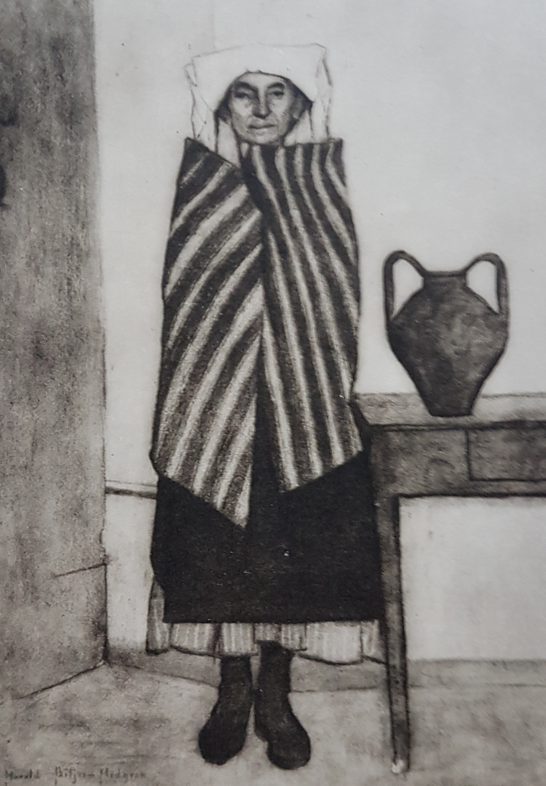 Italiensk kvinna målad av Harald Biljer-Hedgren, avfotograferad bild från Allhems Svenskt konstnärslexikon.